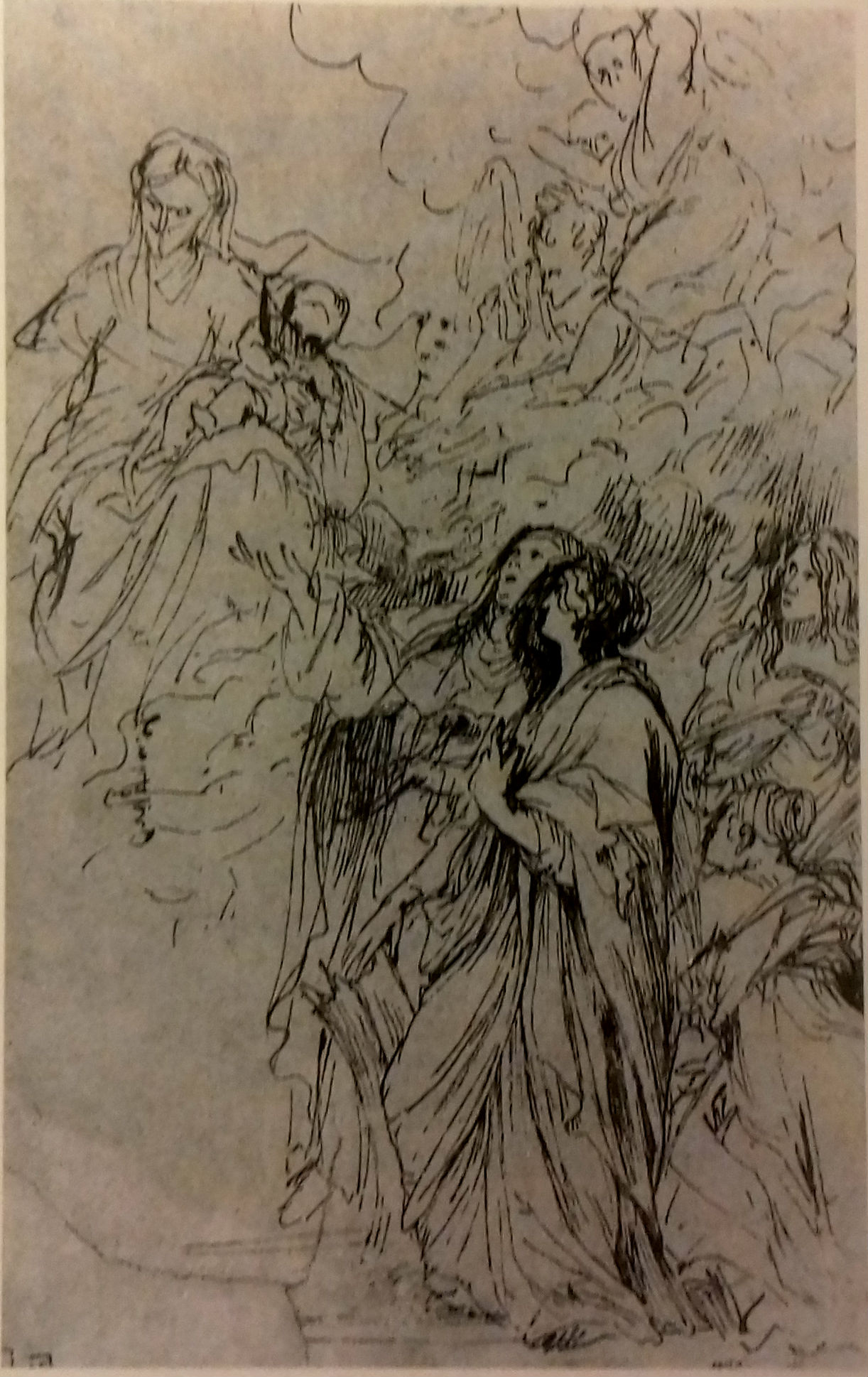 Studio per la Madonna del Rosario dell'Oratorio di San Domenico a Palermo